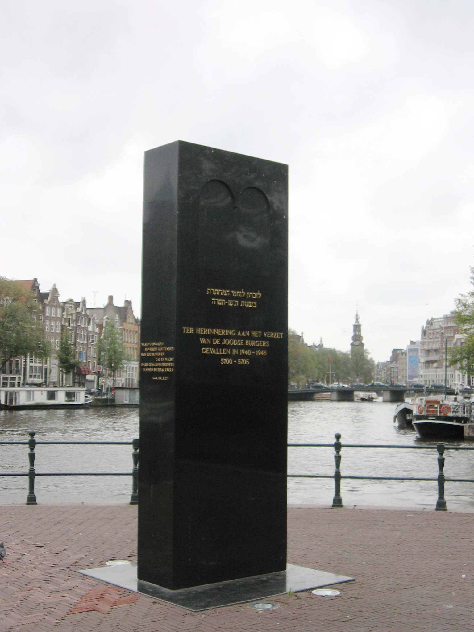 Monument Joods Verzet, Amsterdam